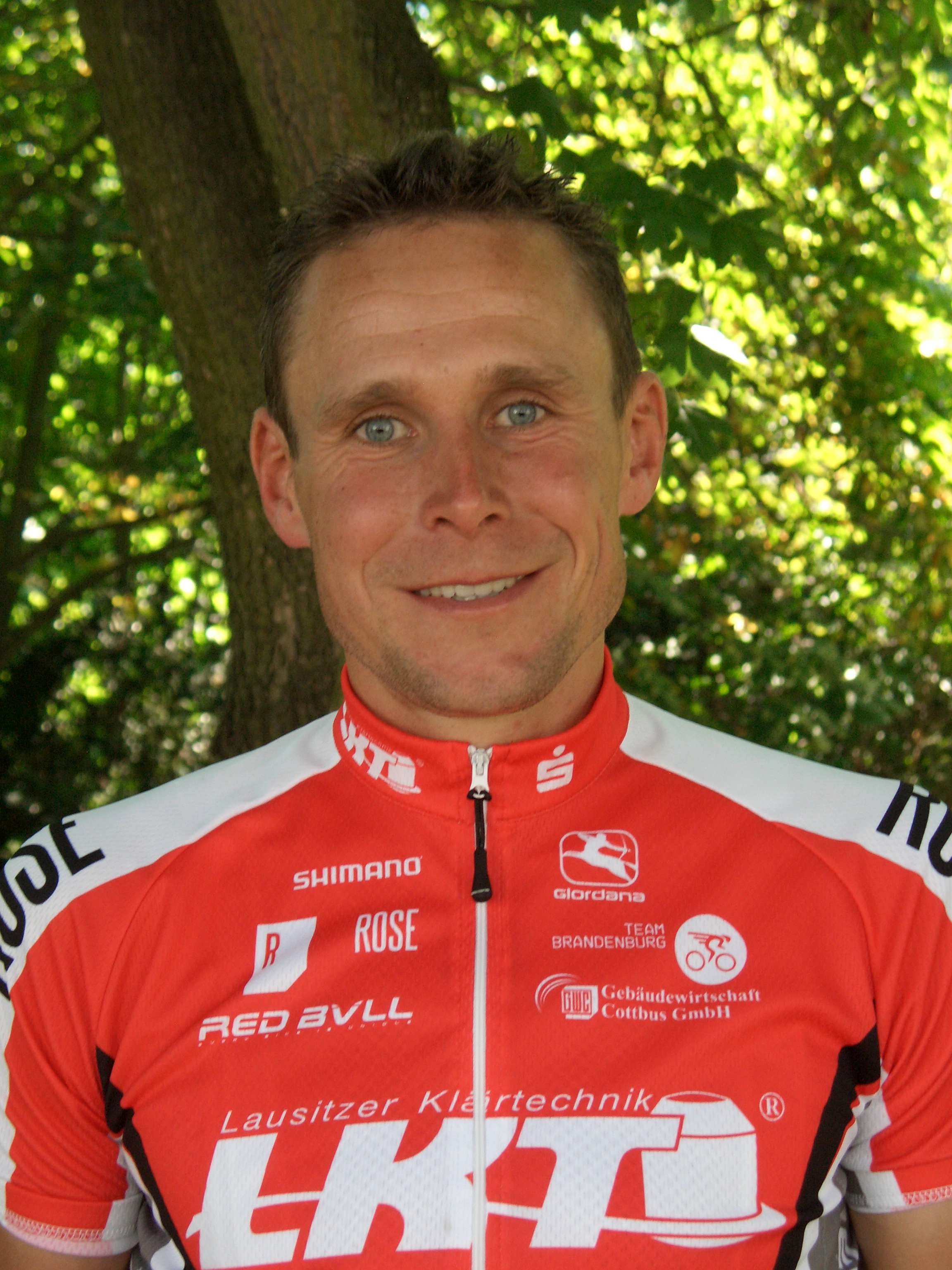 Robert Bartko, Radsportler